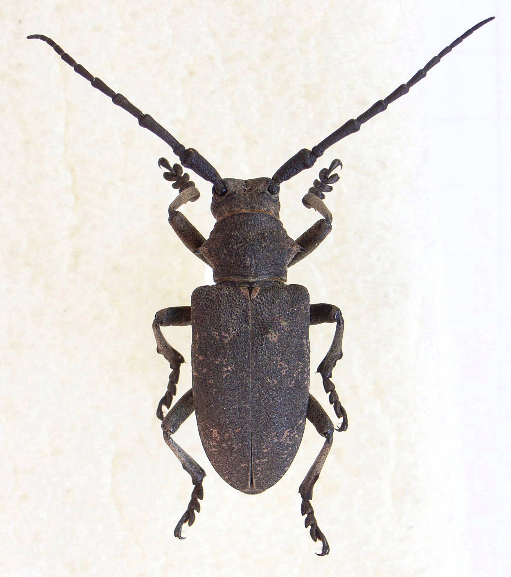 Lamia textor, Nadel wegretuschiert